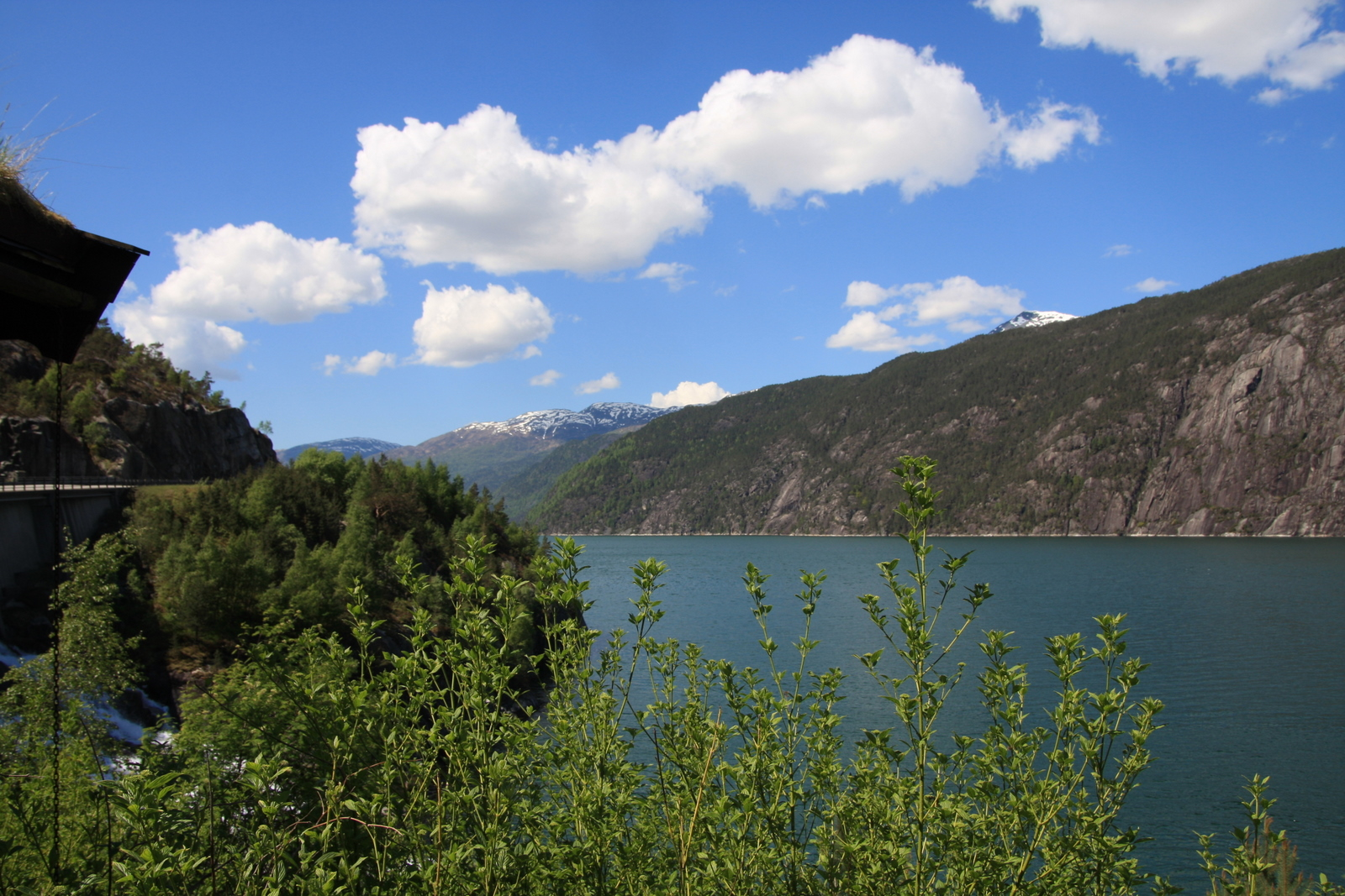 Åkrafjorden, Hordland